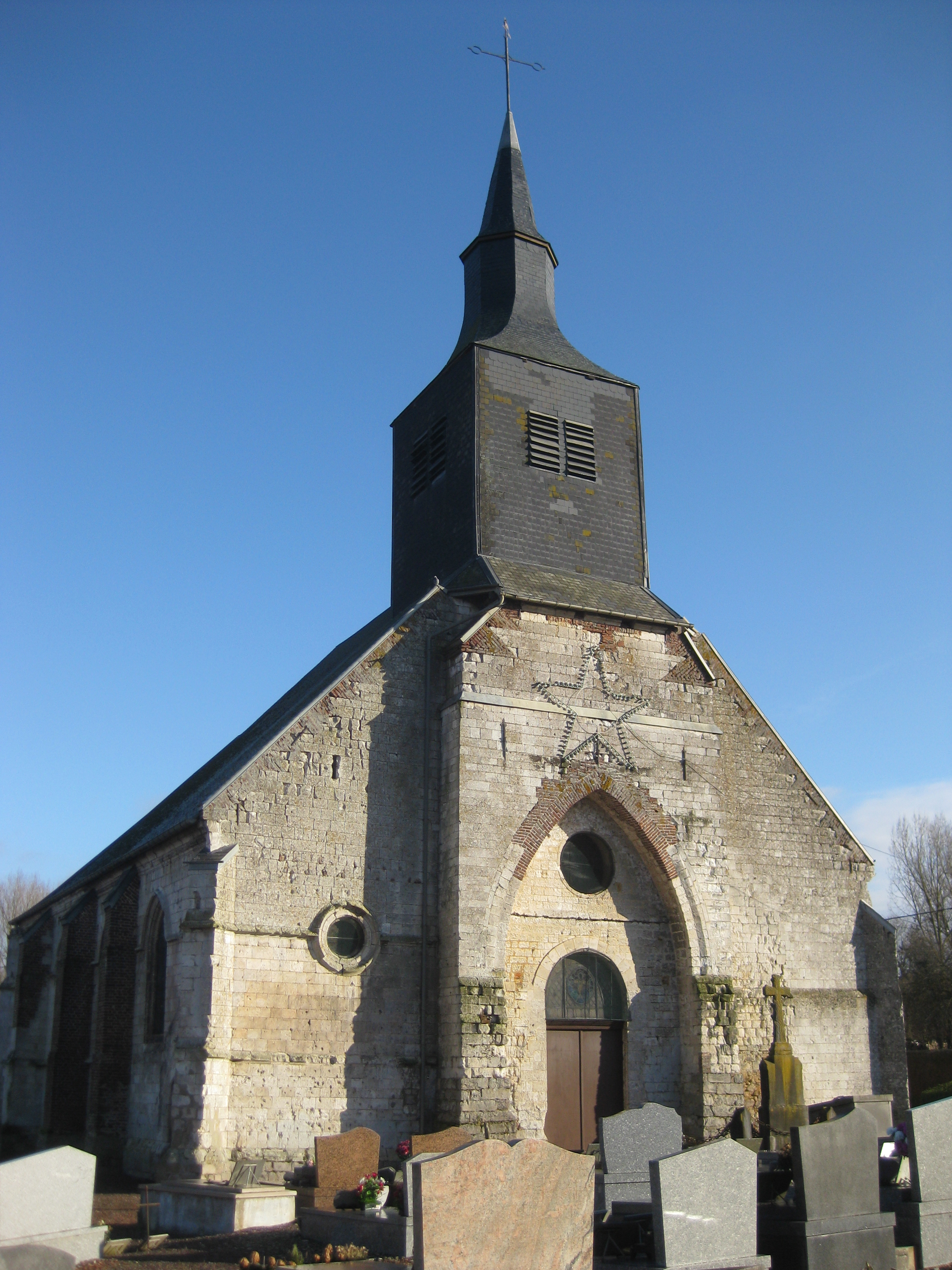 Eglise de Berlencourt-le-Cauroy - Pas de Calais - France